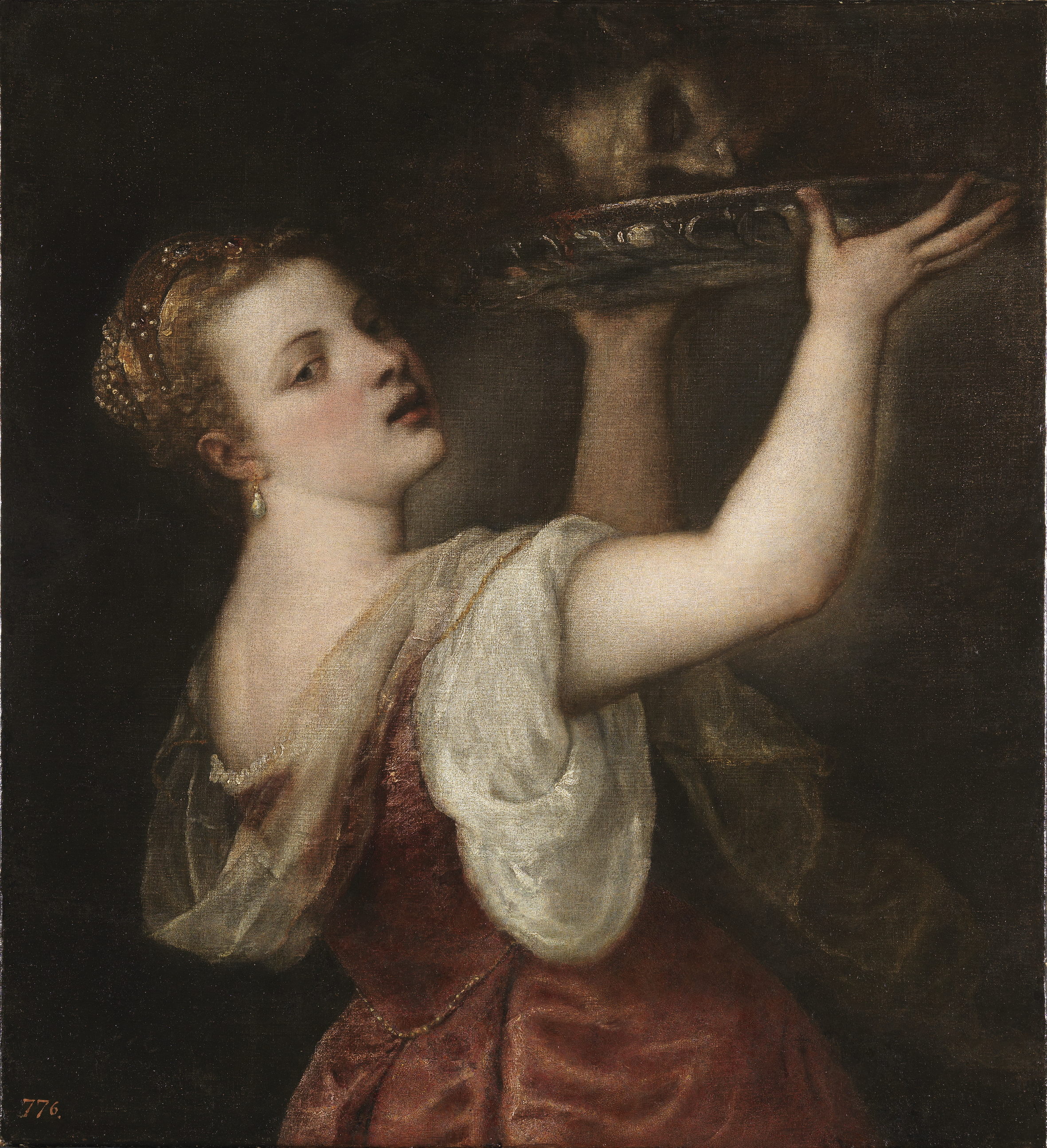 La obra representa a la princesa judía Salomé llevando en su mano una bandeja con la cabeza del profeta San Juan Bautista.